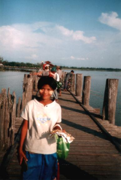 Girl with thanaka in Myanmar